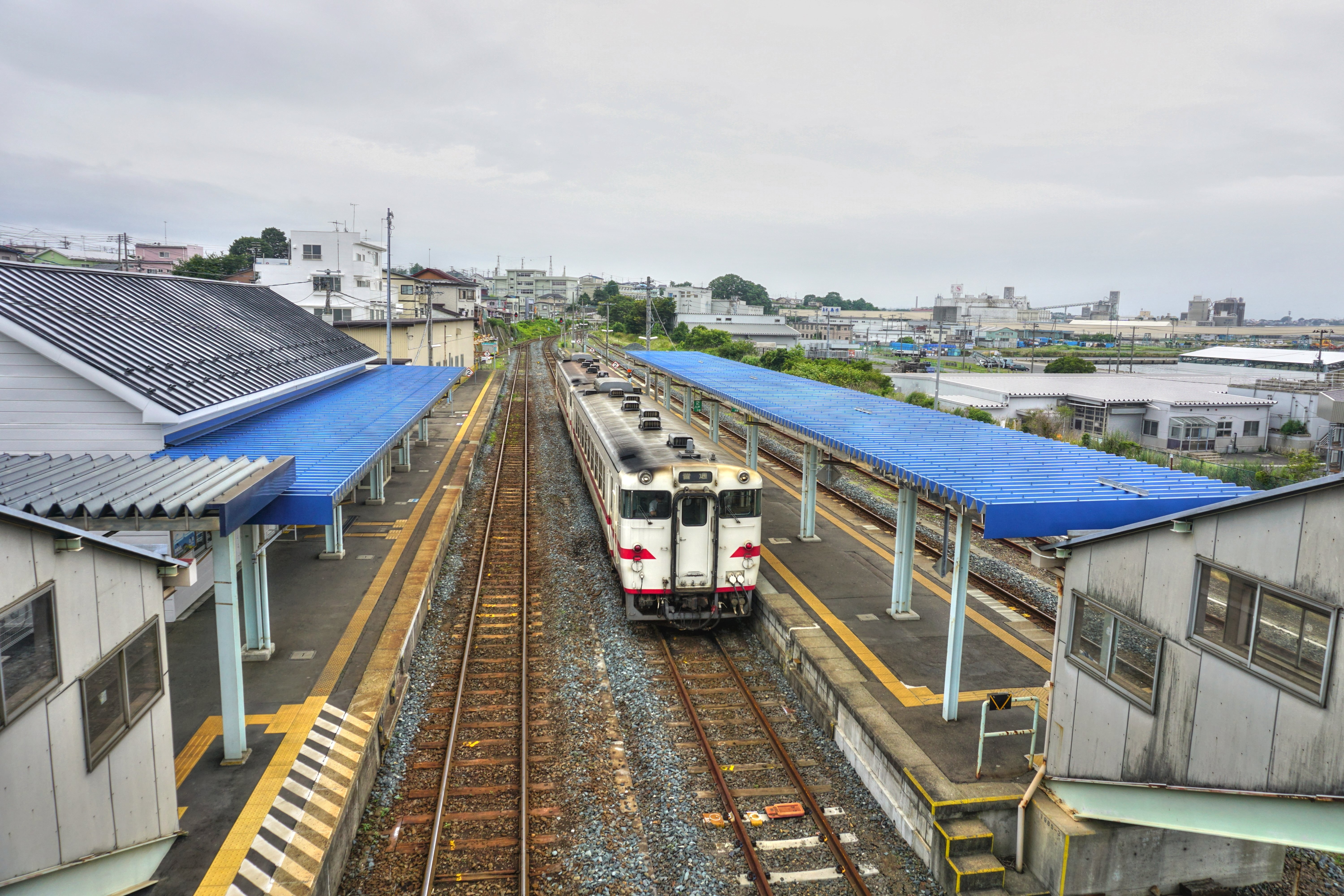 青森県八戸市、鮫駅、八戸線